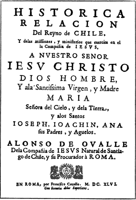 "Histórica relación del Reyno de Chile" por Alonso de Ovalle (Santiago;27 de julio de 1603 - Lima; mayo de 1651)